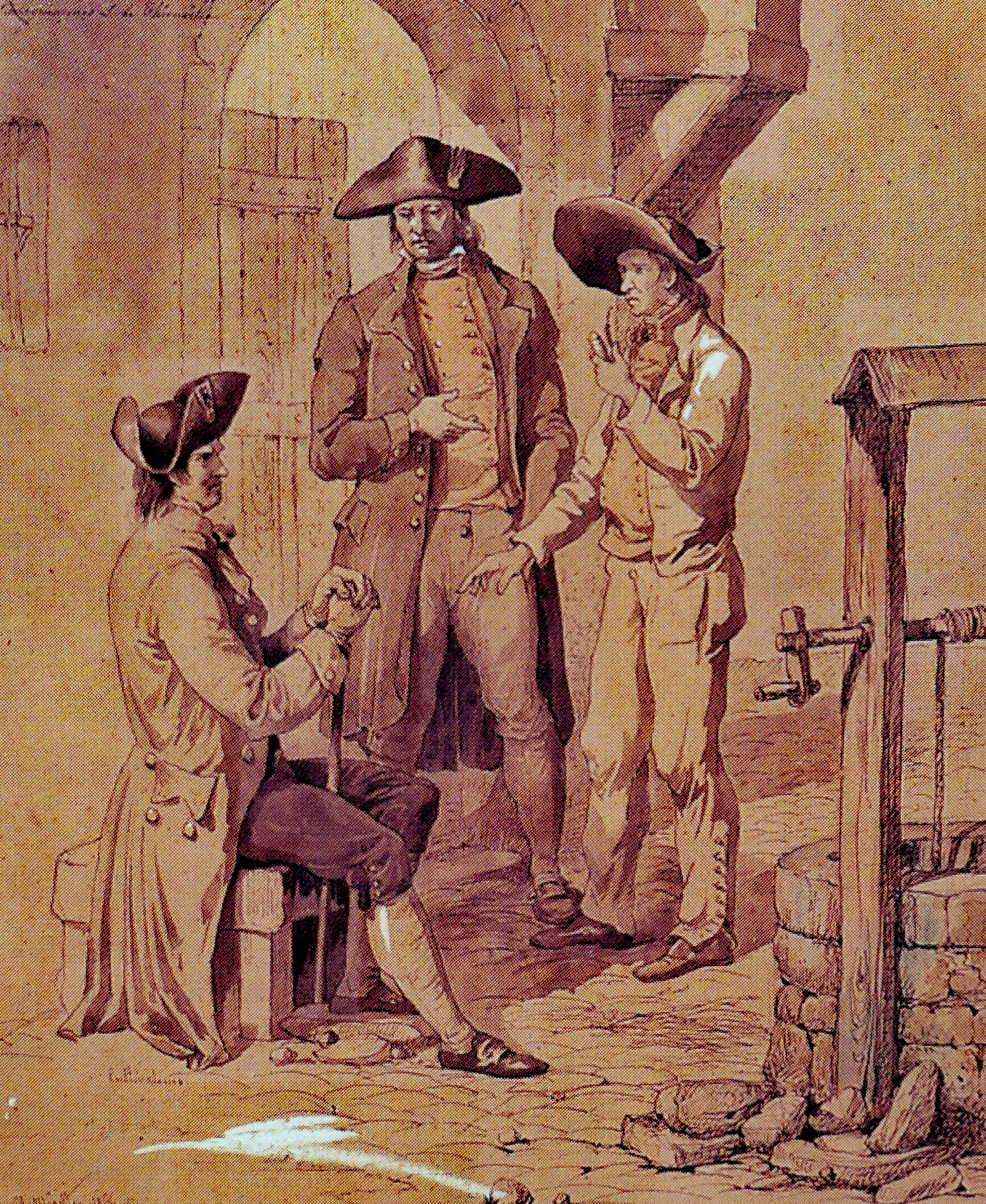 August Migette (1802 in Trier - 1884 in Metz): Traditionelle Kleidung im deutschsprachigen Lothringen, Aquarell vom Mai 1866